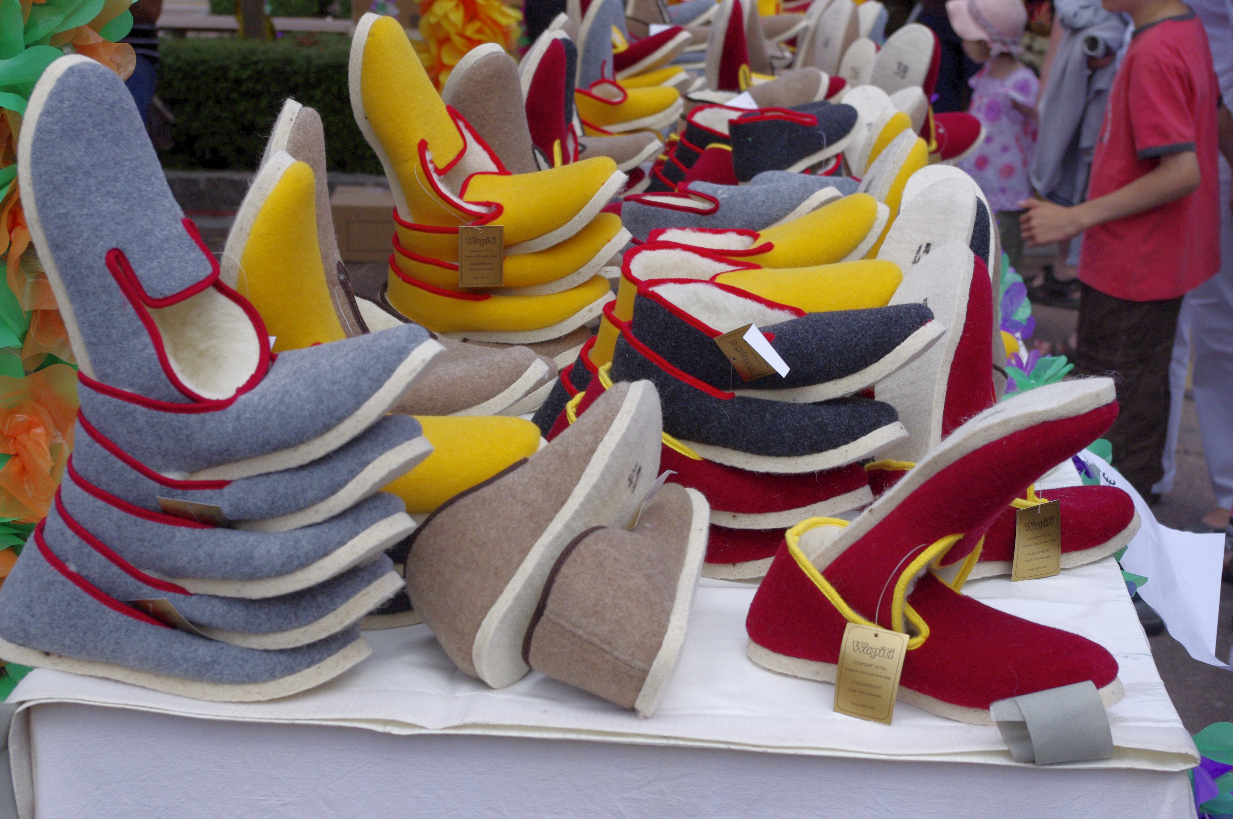 Félibrée à Piégut-Pluviers 2012 - étale avec des charentaises.